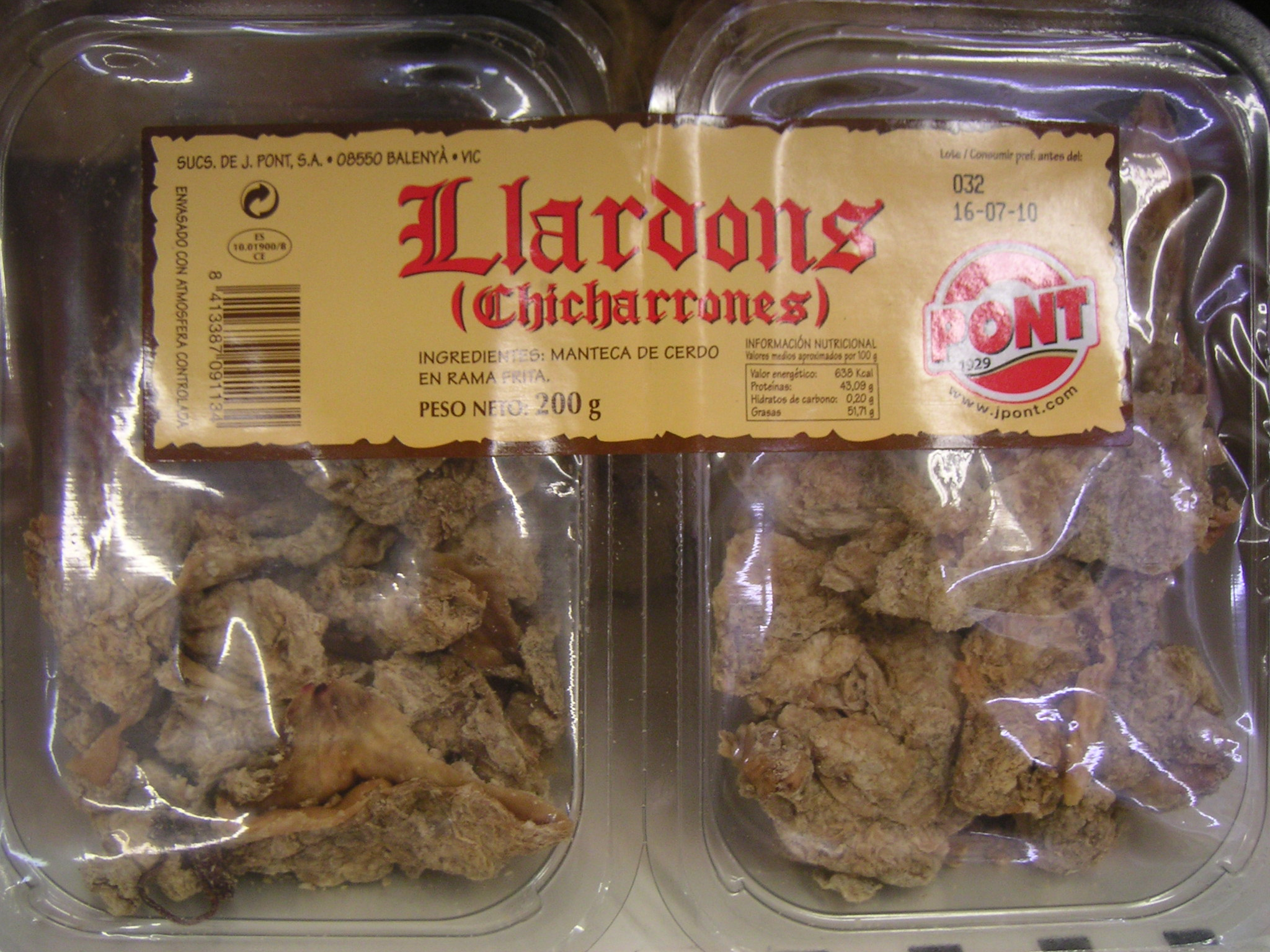 Llardons envasats en un supermercat de Barcelona. Es venen especialment per Carnaval per a fer coques de llardons.